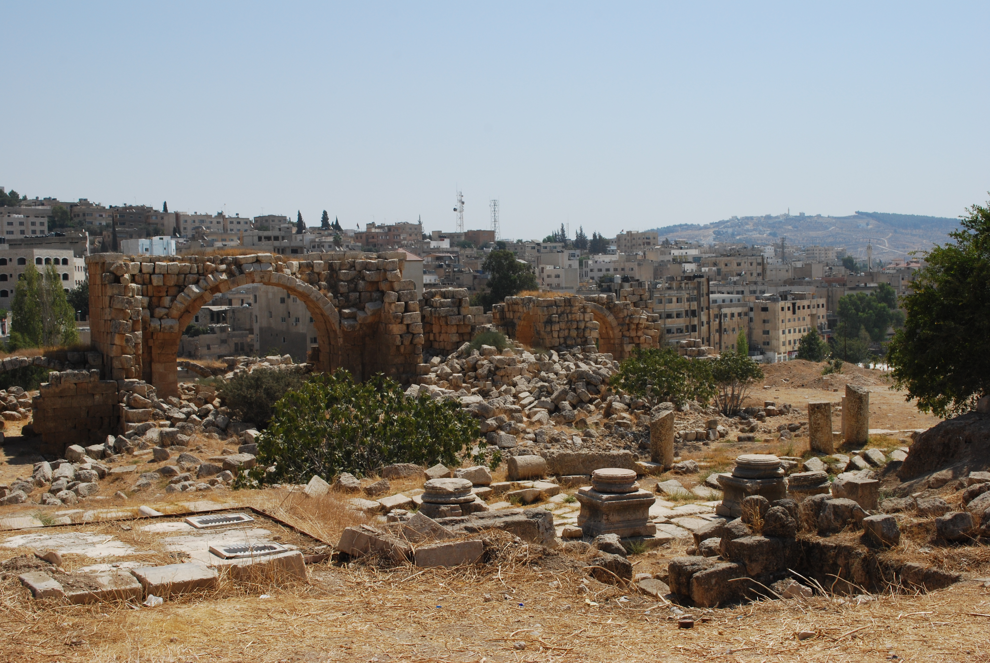 Les bains ouest de Jerash.